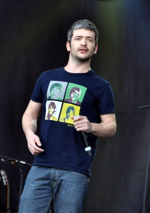 Grégoire au concert pour l'égalité de SOS-Racisme